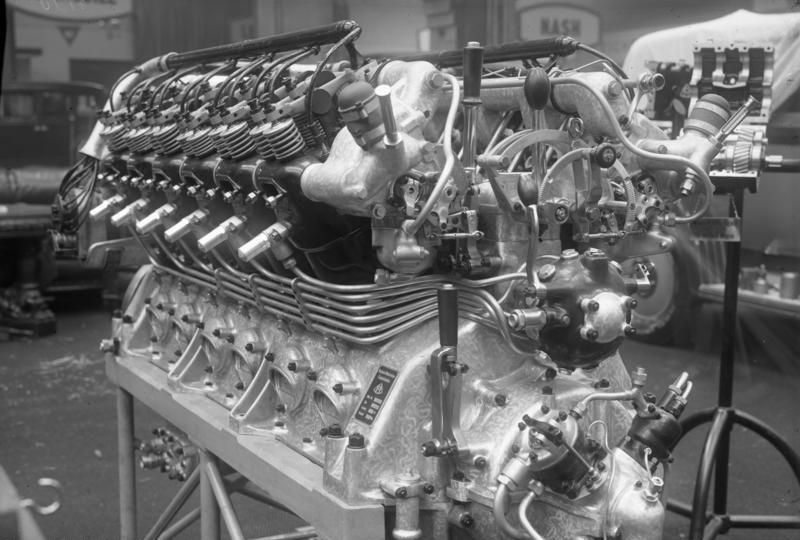 Zu der Notlandung des "Graf Zeppelin" auf seiner Amerikafahrt in Toulon/Frankreich! Das Herz des Zeppelins, einer der fünf riesigen Maybach-Zeppelin-Motoren von 550 PS.